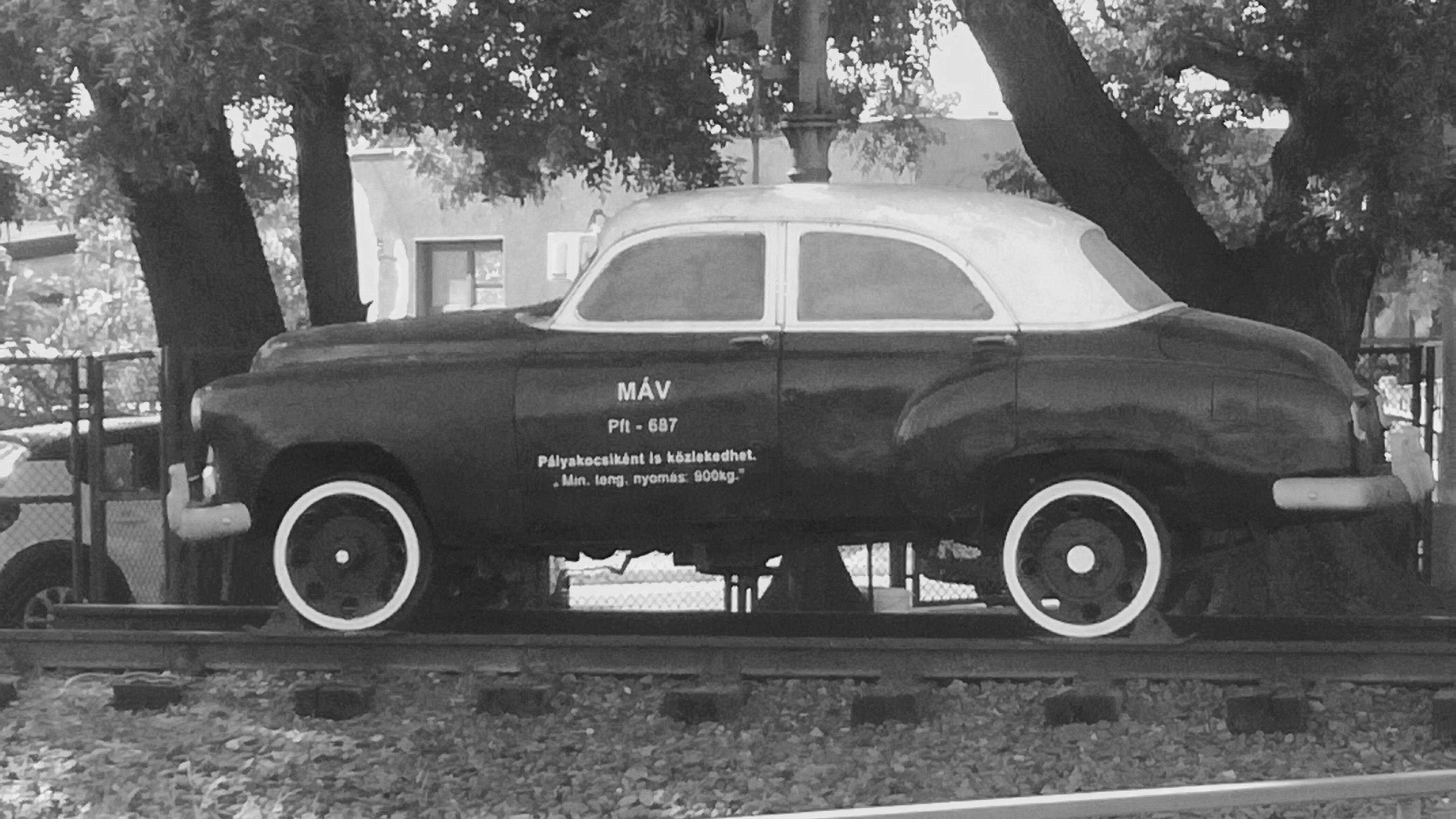 Mezőtúri vasútállomás Warszawa sínautó (Pft-687)Mezőtúr railway station, exhibited MÁV Warszawa draisine no. 687